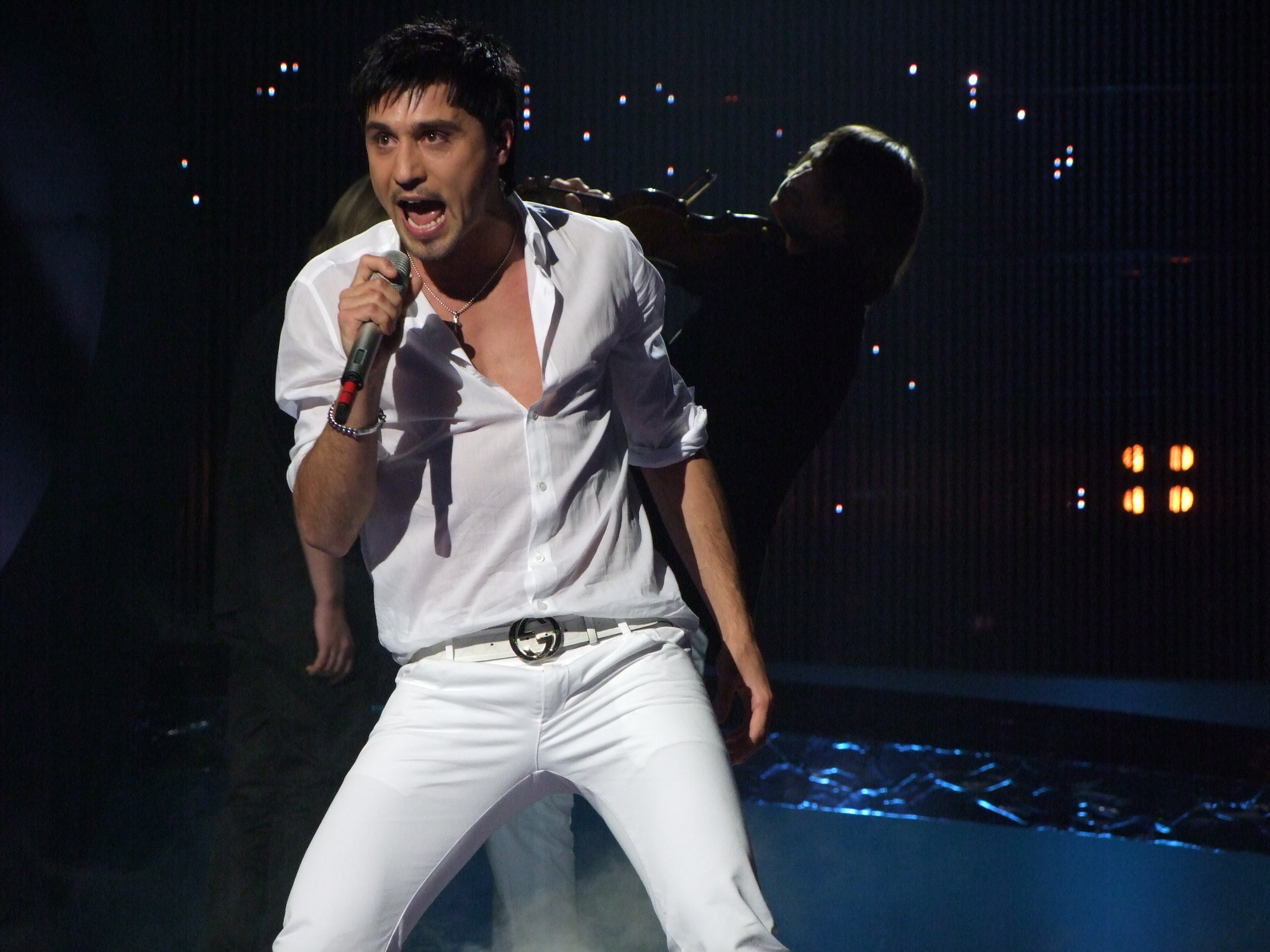 Semifinal 1 EUROVISION 2008